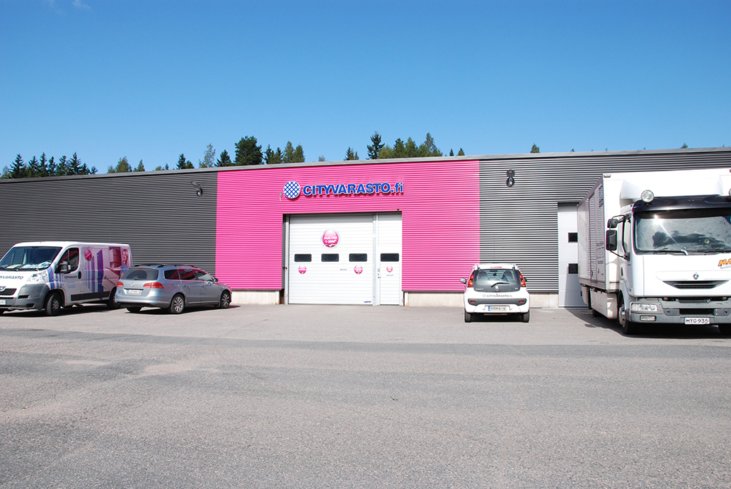 Cityvarasto Keravalla. Rakennuksessa vuokrataan pienvarastoja.